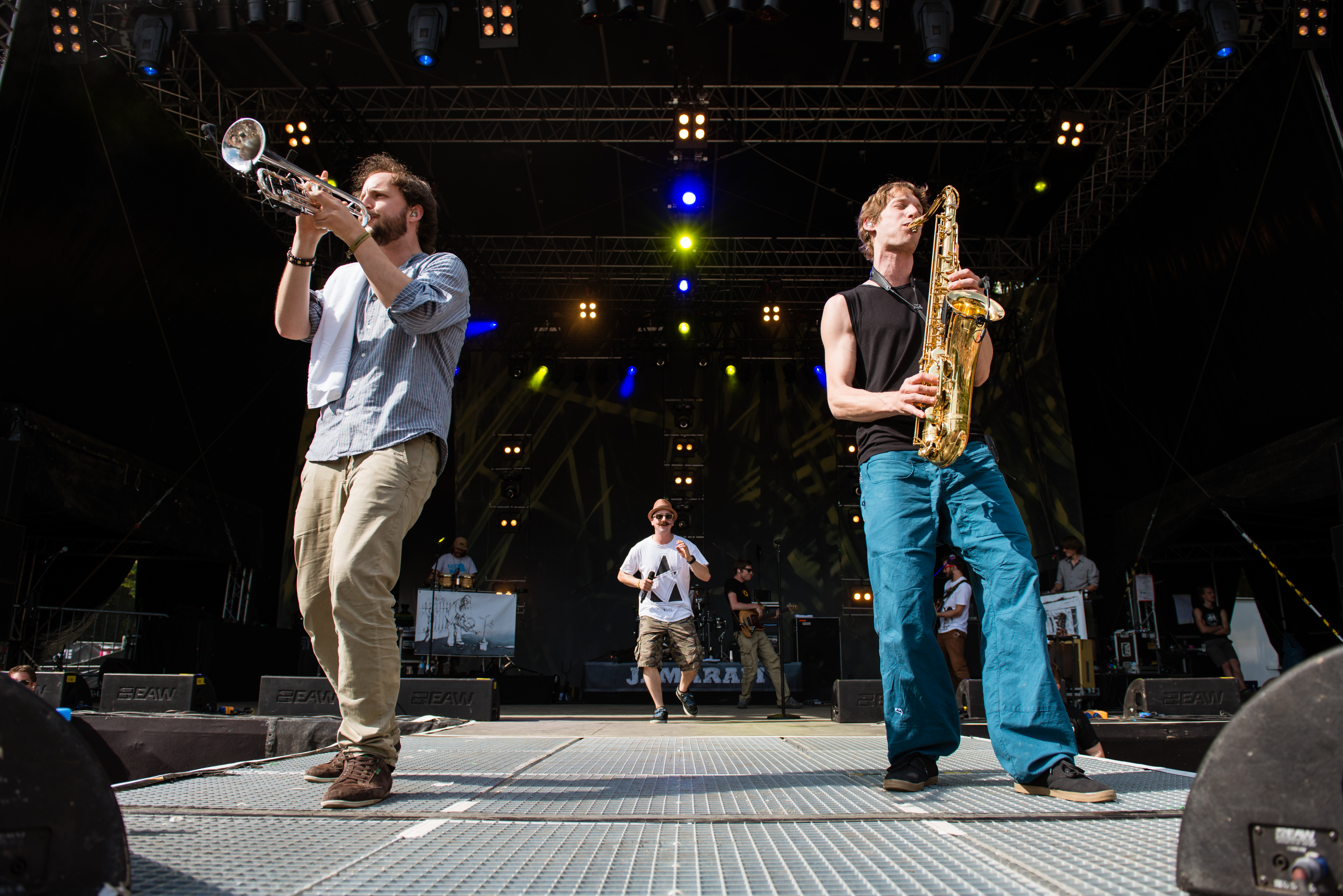 'Ruhr Reggae Summer 2014 - Dortmund': 'Jamaram'